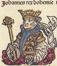 Jan Lucemburský